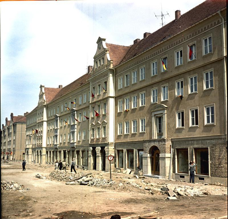 Neubrandenburg, Zentrum Neu Brandenburg, Zentrum [Neubrandenburg, Sanierung von Altbauten im Stadtzentrum]